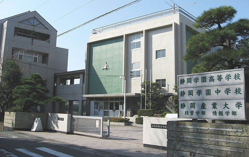 Shizuoka Gakuen School, Shizuoka, Japan